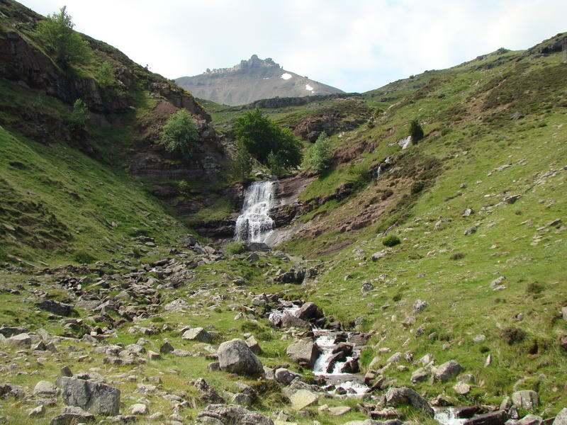 Tramo inicial del río Urbión a su paso por el Valle de Urbión. Detrás, el pico Urbión (2.228 metros)